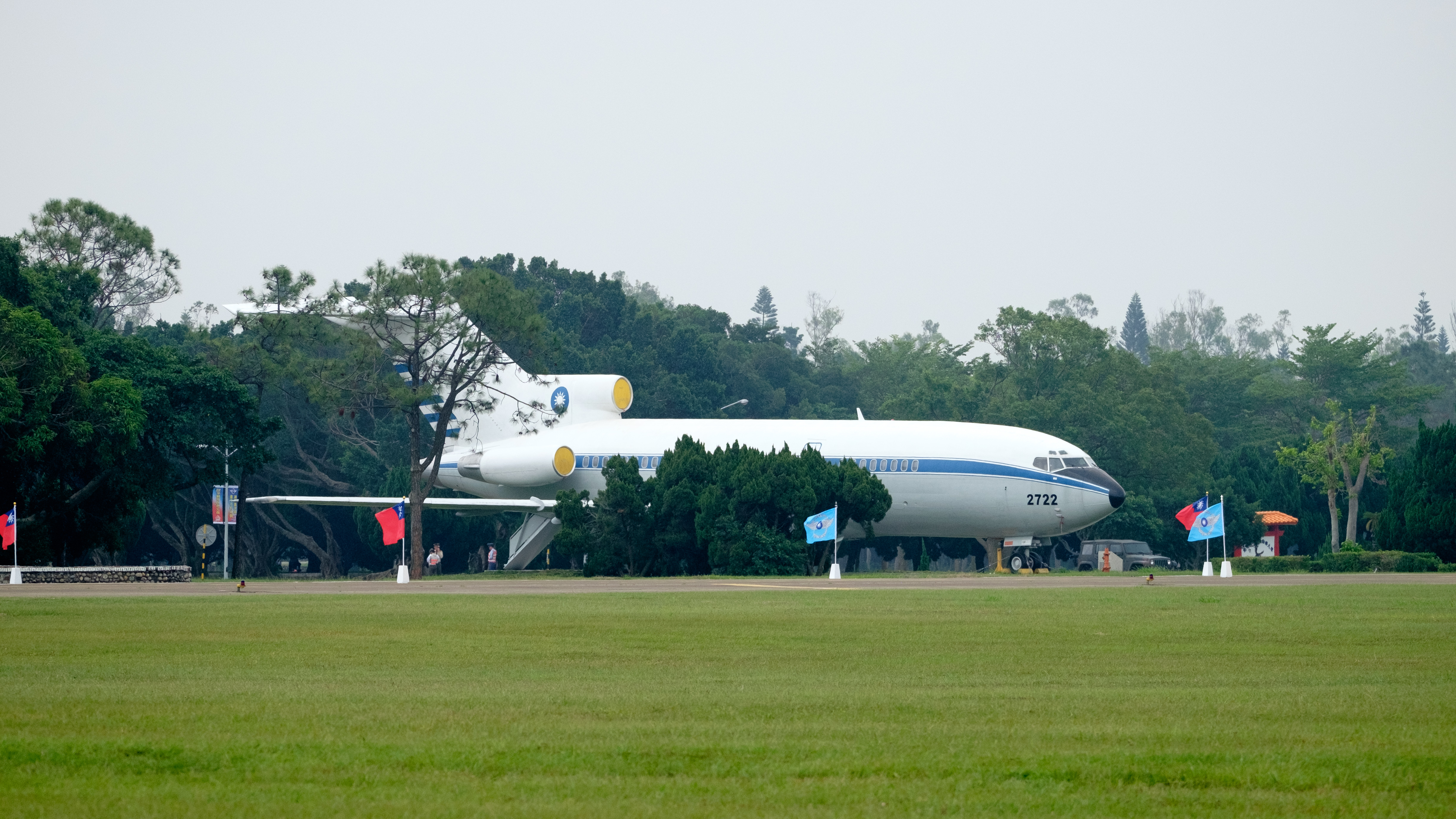 2015年移設空軍清泉崗基地靜態保存的原中華民國總統行政專機波音727-100 2722，攝於2016年基地營區開放活動。